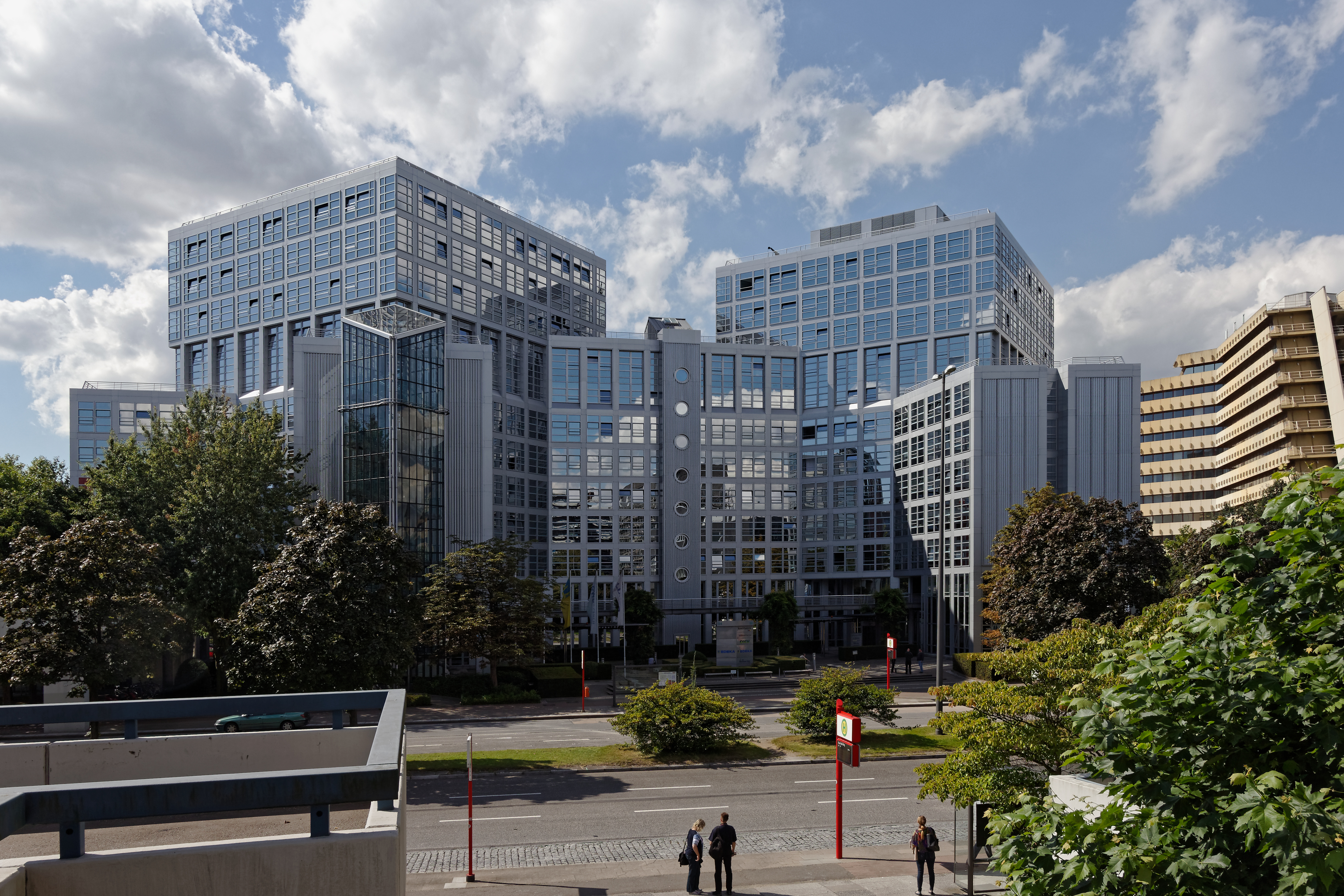 Hamburg-Winterhude, City Nord, Bürogebäude Überseering 32 und 34, sog. "Silberling"This is a photograph of an architectural monument.